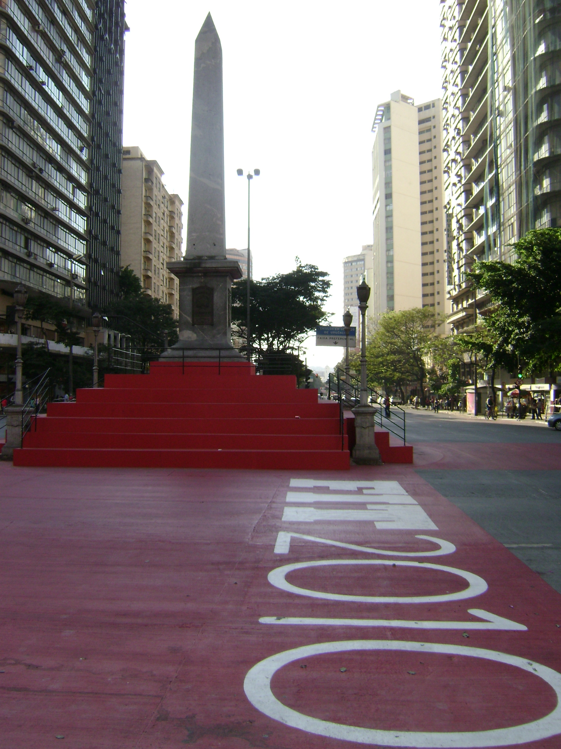 Obelisco da Praça Sete durante o Festival Internacional de Teatro, Palco e Rua, em Belo Horizonte.